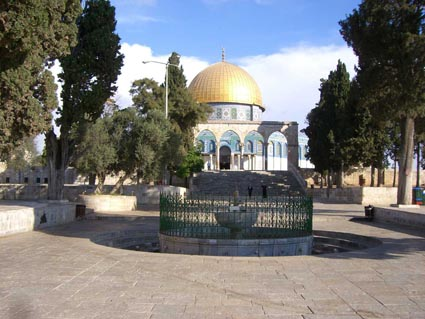 Temple mount plan